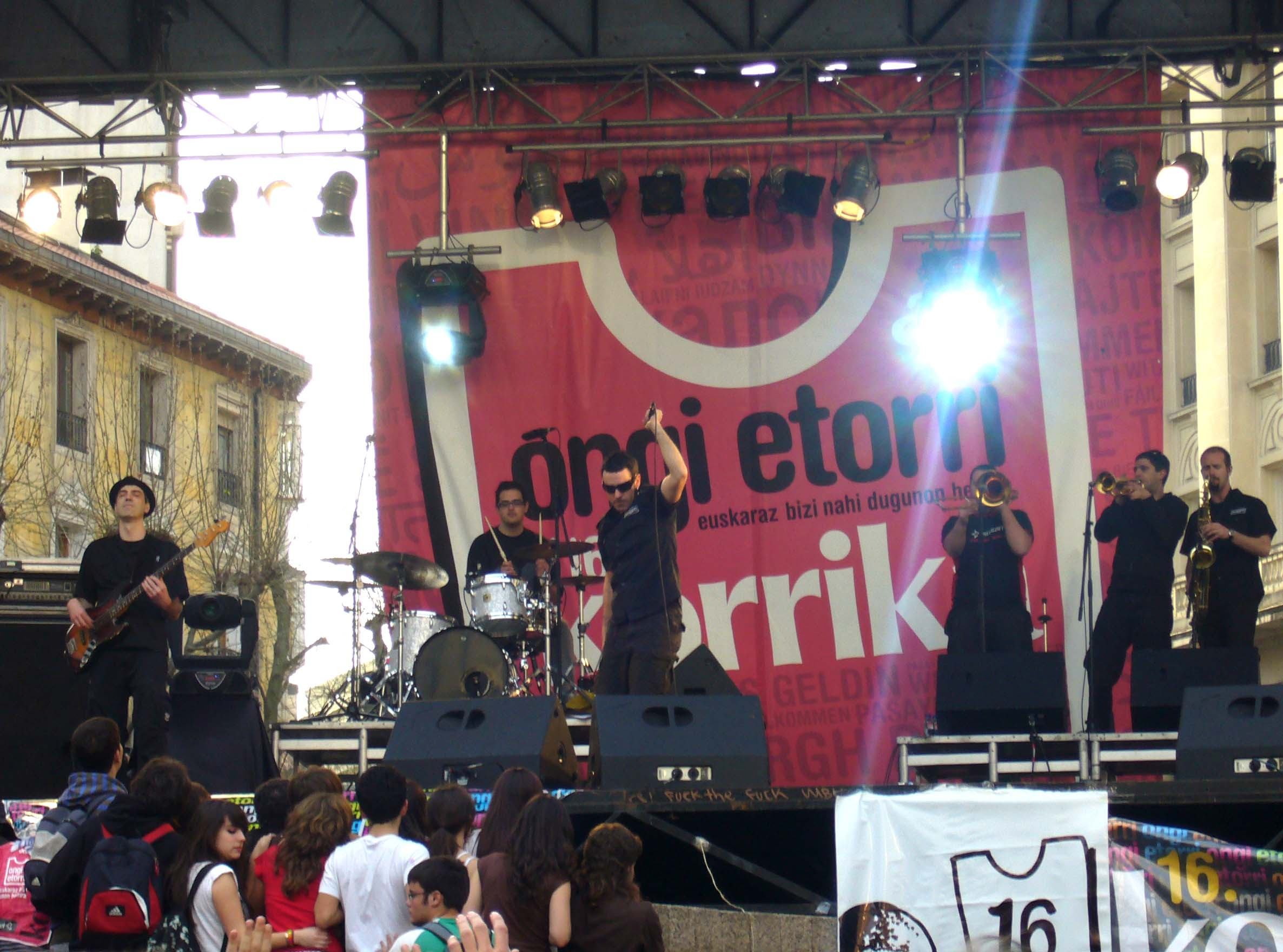 Betagarri musika-talde gasteiztarra, 2009ko Korrikaren amaiera-ekitaldiko emanaldian.